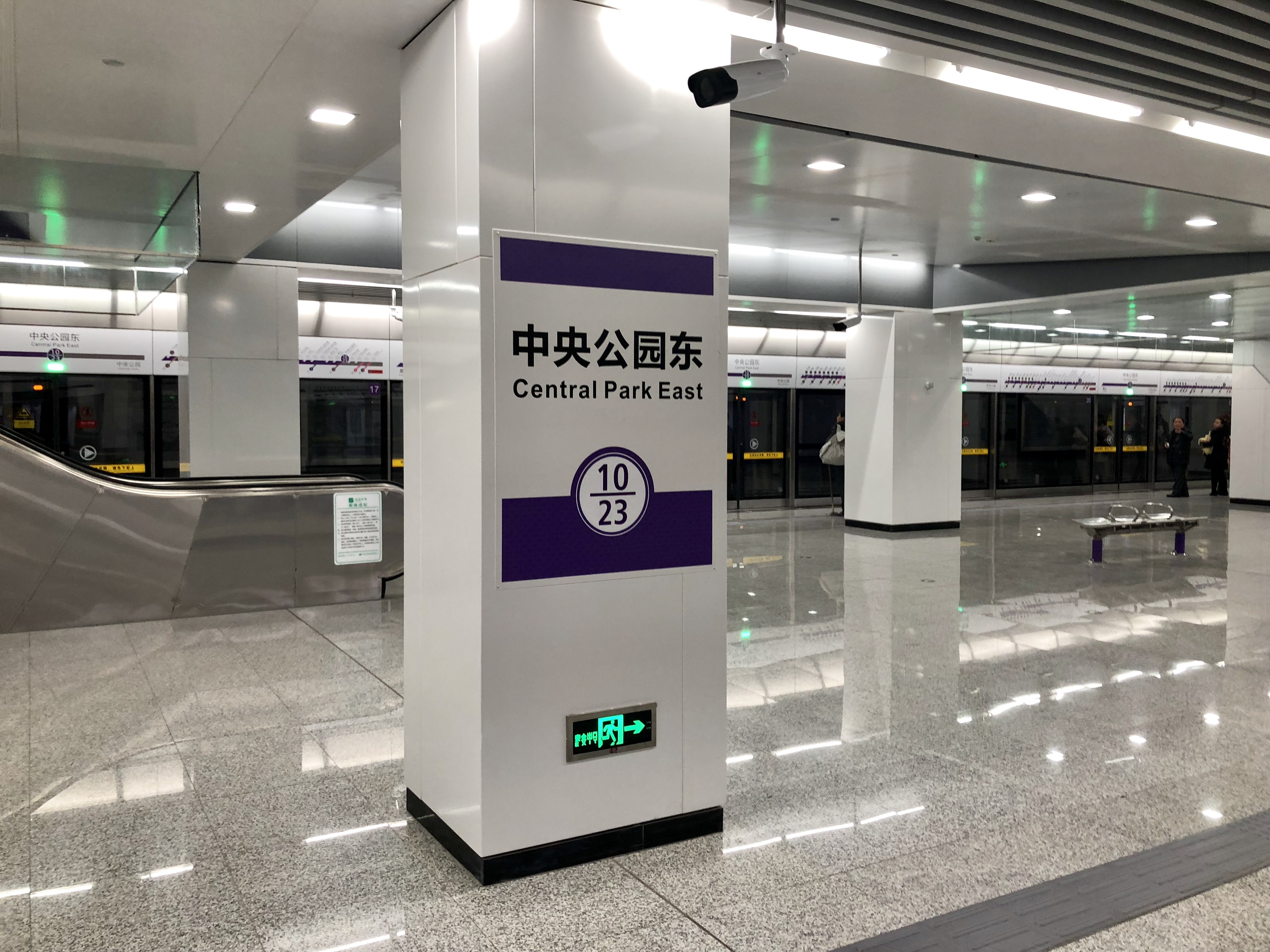 10号线中央公园东站